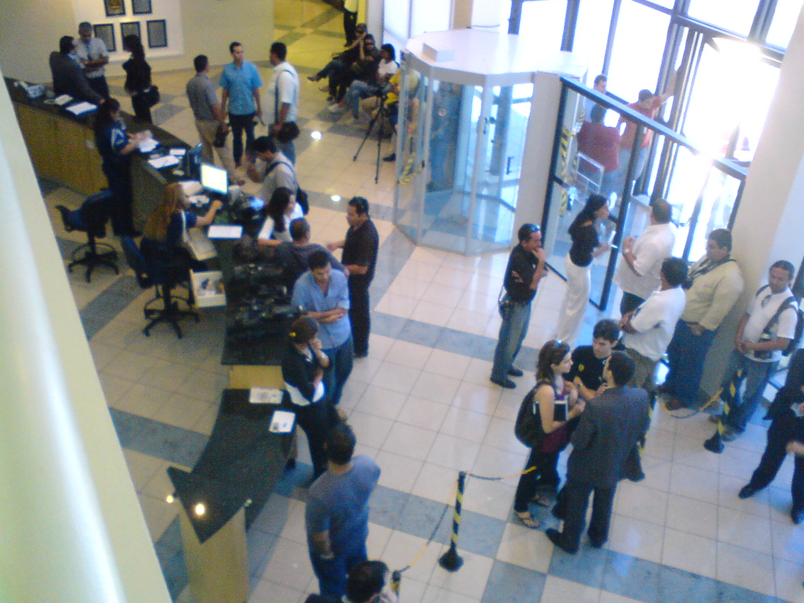 Saguão da Superintendência de Polícia Federal em Natal, Rio Grande do Norte, na manhã de 19 de junho de 2008. Operação Hígia; grande movimentação de repórteres.